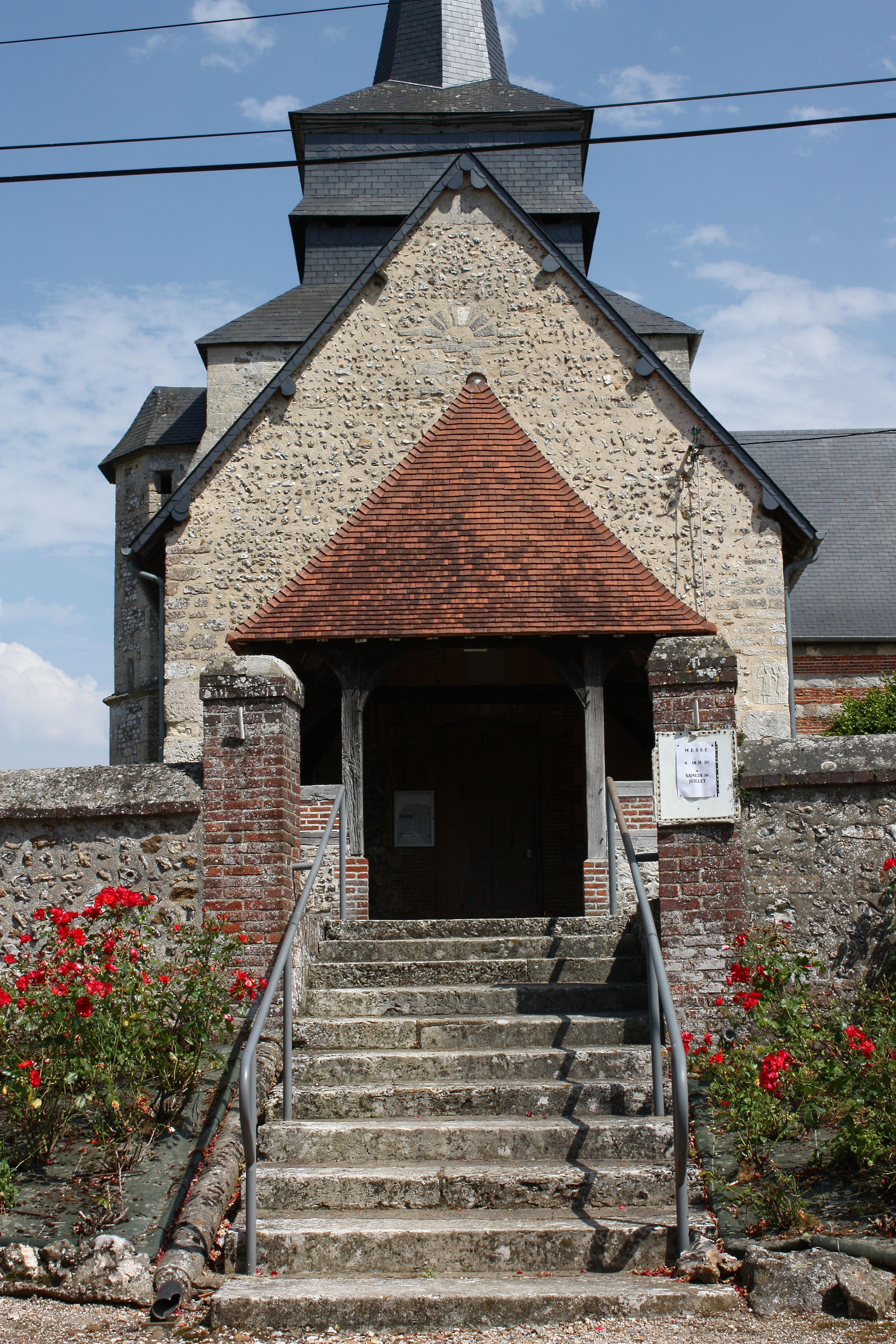 Coudray, église